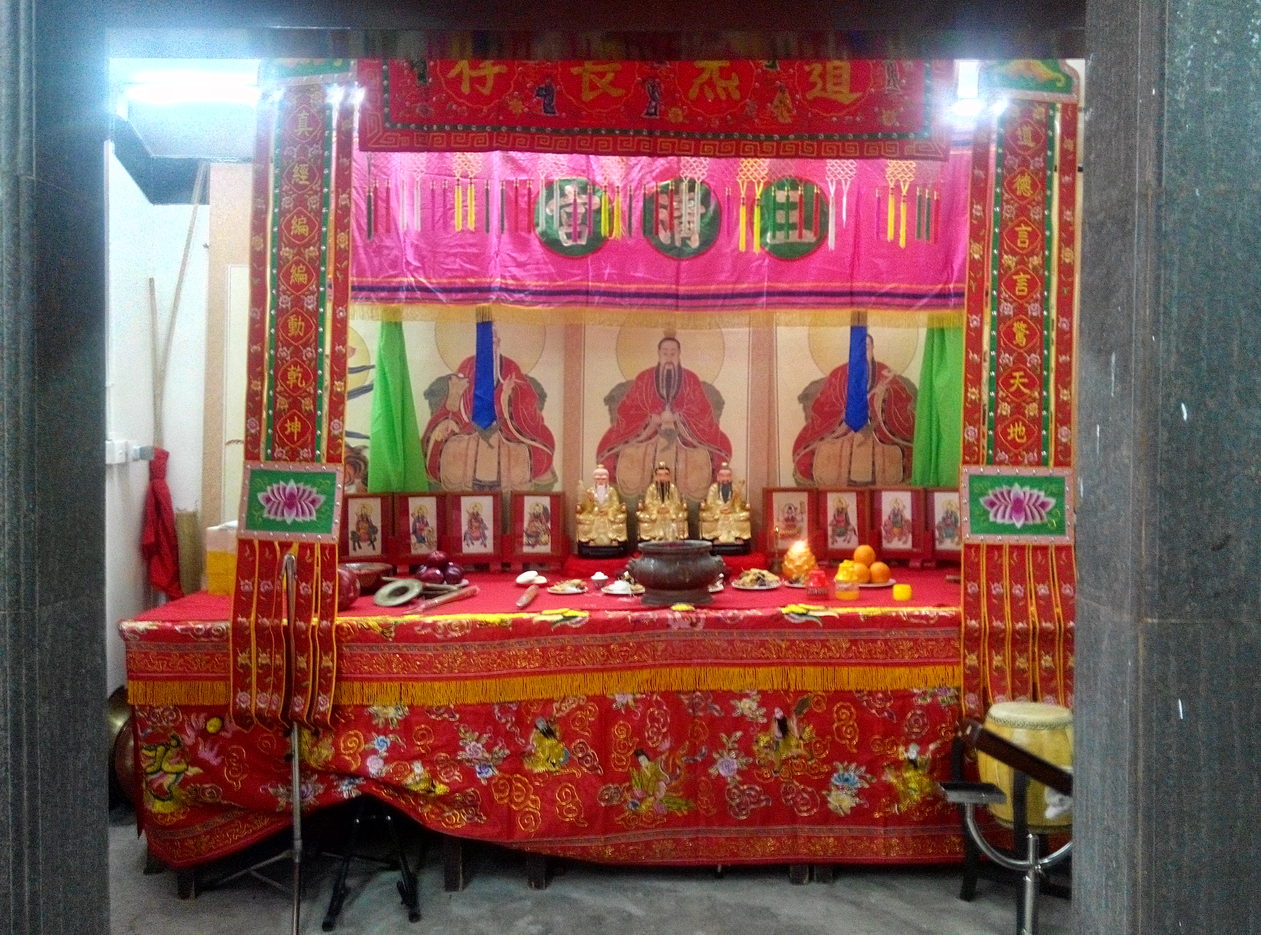 泰亨鄉太平清醮的喃嘸棚設於天后廟內